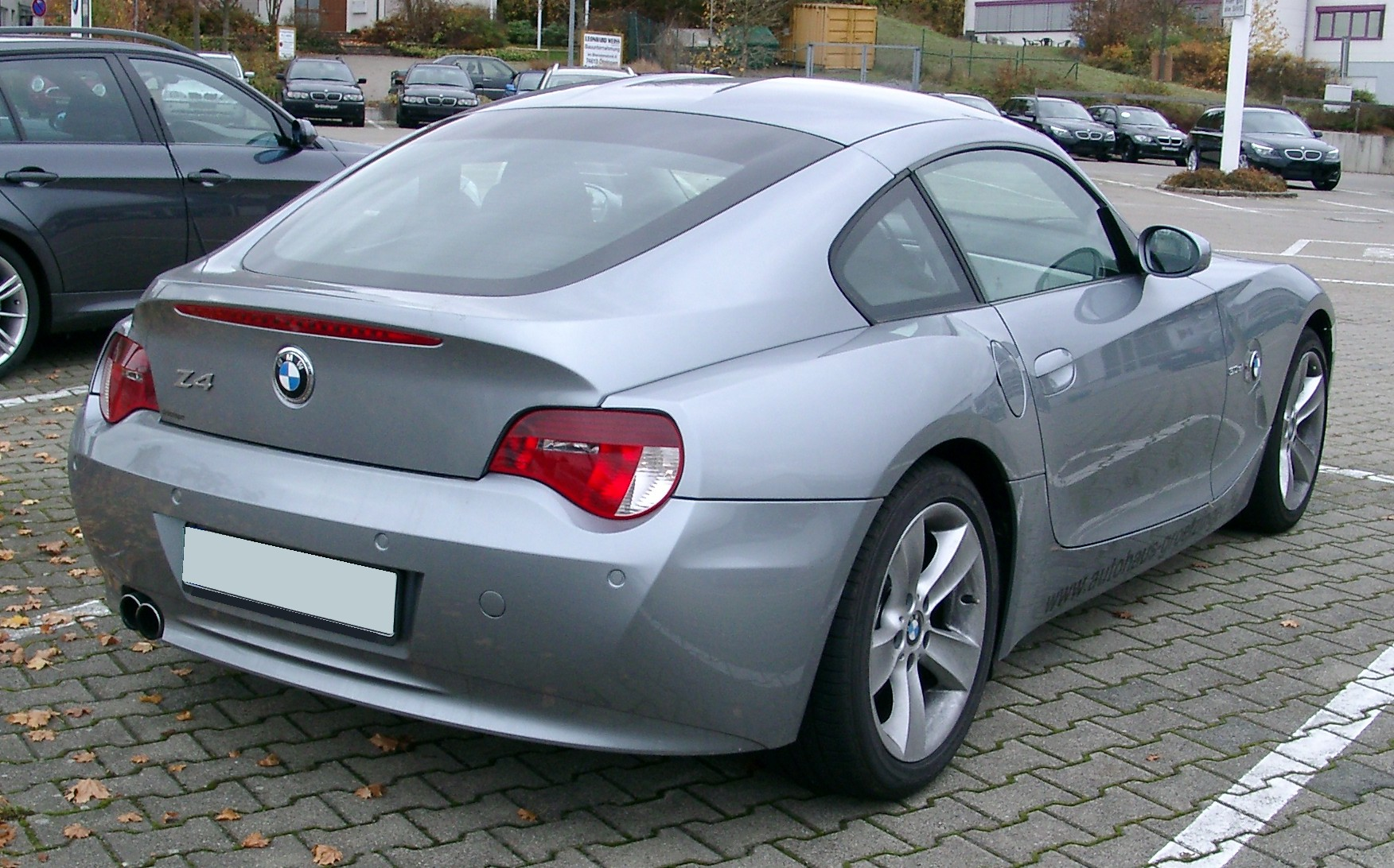 BMW Z4